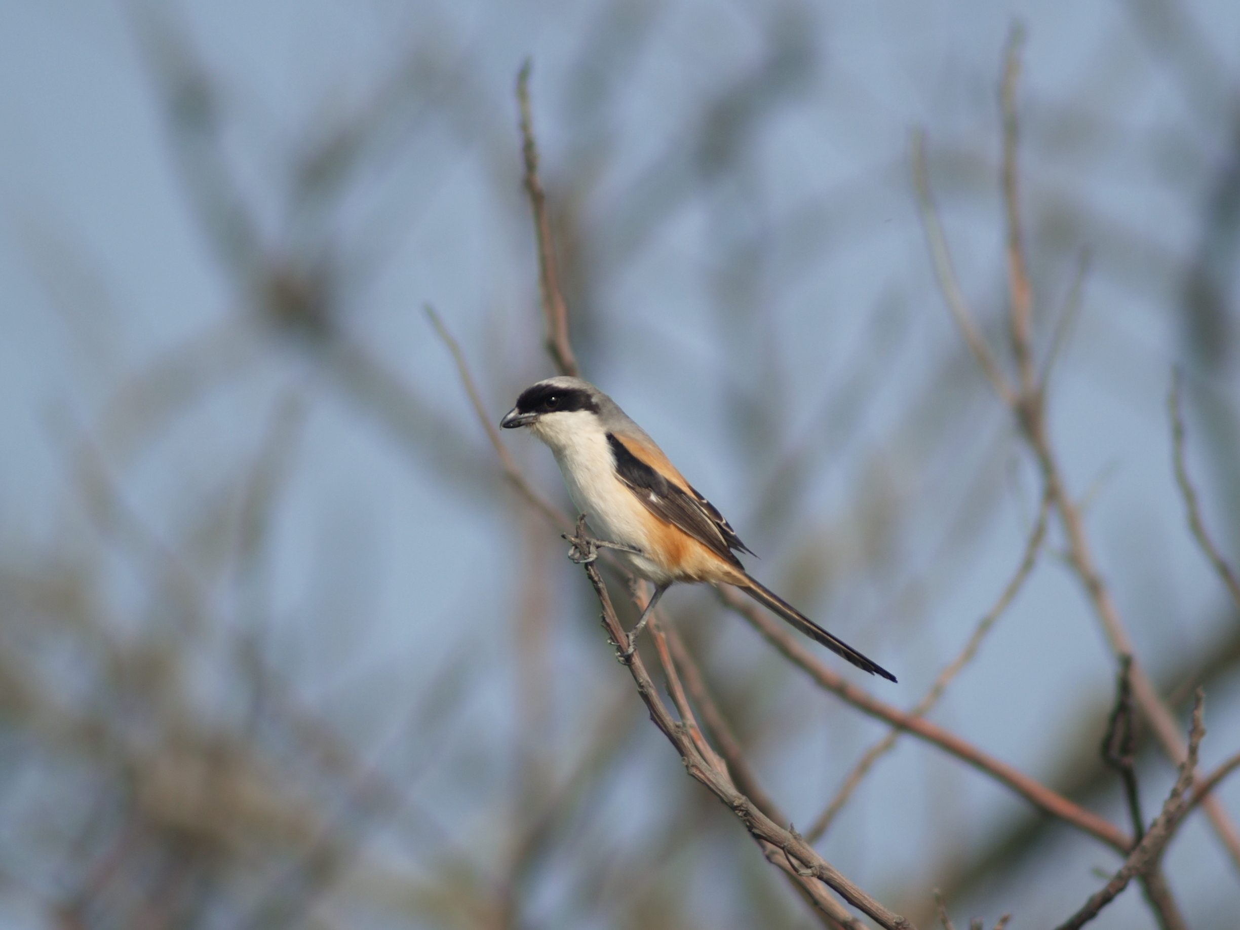 Lanius schach 棕背伯勞